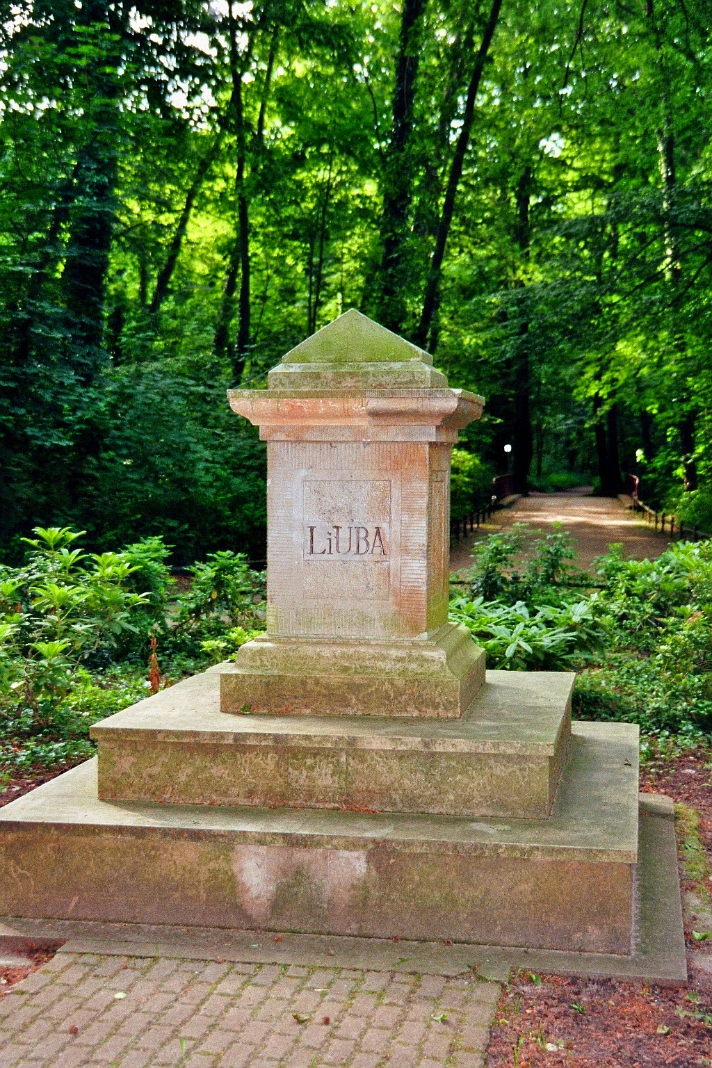 Liuba-Stein im Naturschutzgebiet Lübbener Hain, einem parkähnlichen Restauwald mit alten Eichen, Buchen und Ulmen, in Lübben, Landkreis Dahme-Spreewald, Brandenburg, Deutschland. Der so genannte „Liuba-Stein“ verweist auf eine einstige slawische Kultstätte im Lübbener Hain, an der der Volksstamm der Wenden mit Gebet und Opfer der Liebesgöttin Liuba unter der ihr geweihten Eiche huldigte. Zur Erinnerung daran ließ die Stadt Lübben 1854 ein Monument an dieser Stelle bei der Lubans-Eiche errichten. Auf Anordnung des Lübbener Magistrats wurde der Liuba-Stein 1907 allerdings wieder entfernt und an seinen heutigen Platz gebracht. Eine umfassende Restaurierung erfolgte im Jahr 2000.